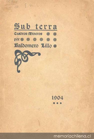 Portada de Sub terra : cuadros mineros. Por Baldomero Lillo. 1a ed. Santiago de Chile : Impr. Moderna, 1904. 221 p.